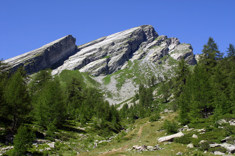 La Pioda di Crana vista dal sentiero per la forcola di Larecchio sopra l'alpe ai Motti, a circa 1900 metri s.l.m.